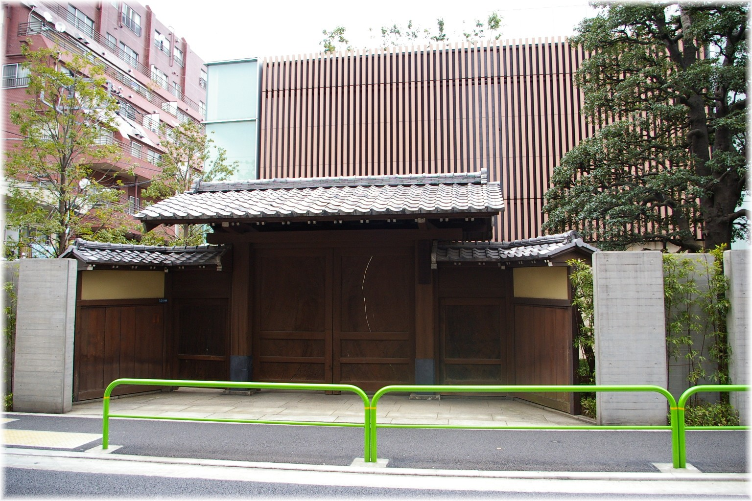 Ich machte dieses Foto von mir in 2006. 味の素グループ高輪研修センタ